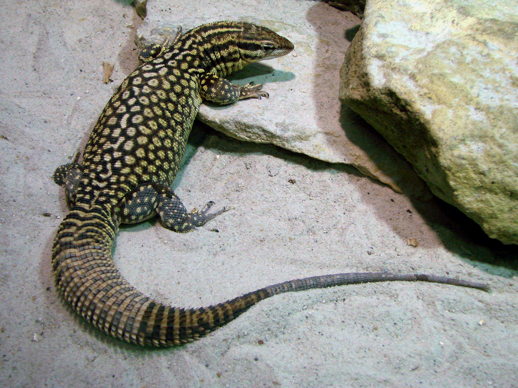 Varan à queue épineuse (Varanus acanthurus), zoo d'Amnéville.